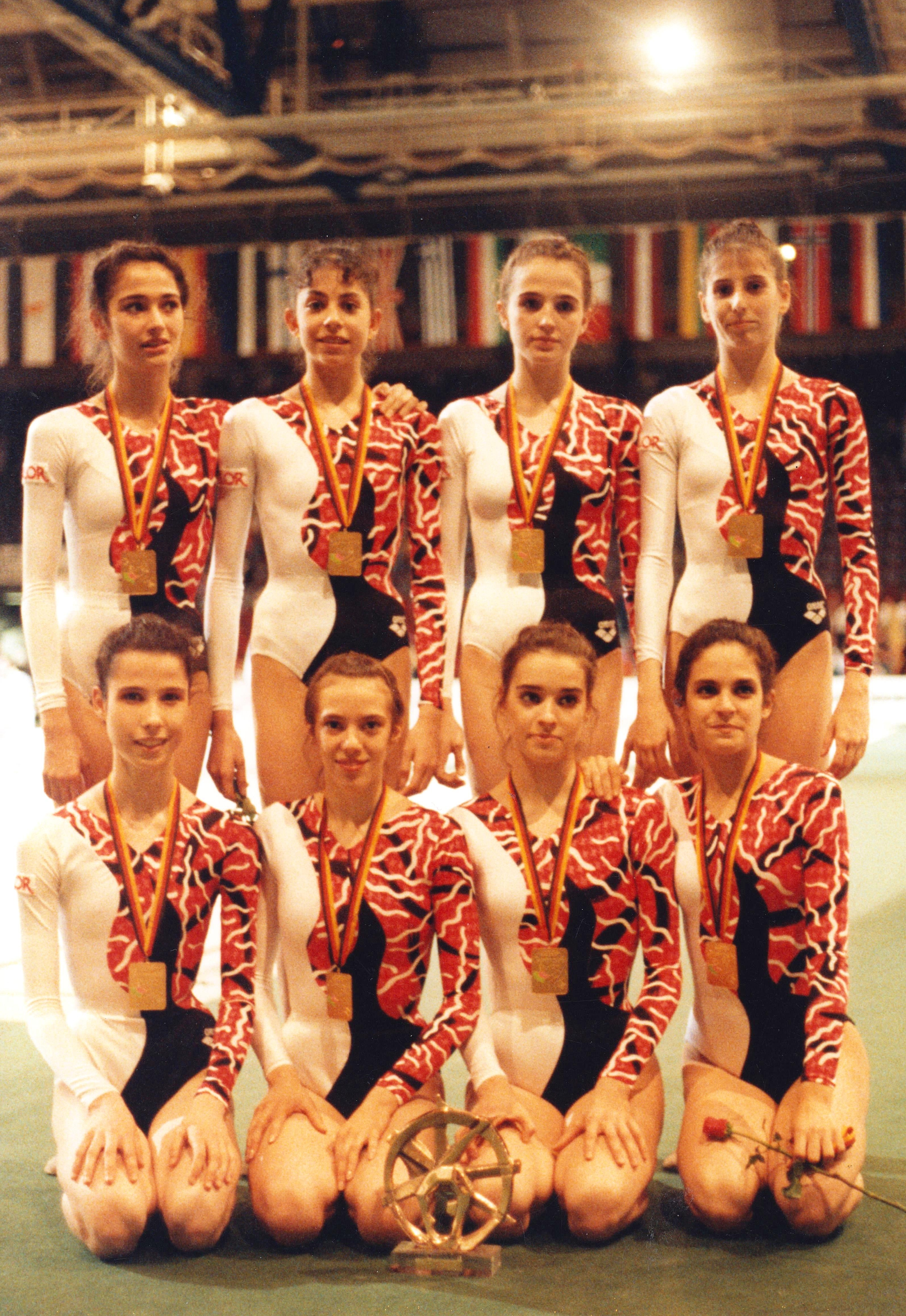 Conjunto español en el Campeonato Europeo de Gimnasia Rítmica de 1992 en Stuttgart. Arriba: Montse Martín, Cristina Martínez, Bito Fuster e Isabel Gómez. Abajo: Alicia Martín, Débora Alonso, Lorea Elso y Gemma Royo. Foto facilitada por Alicia Martín.